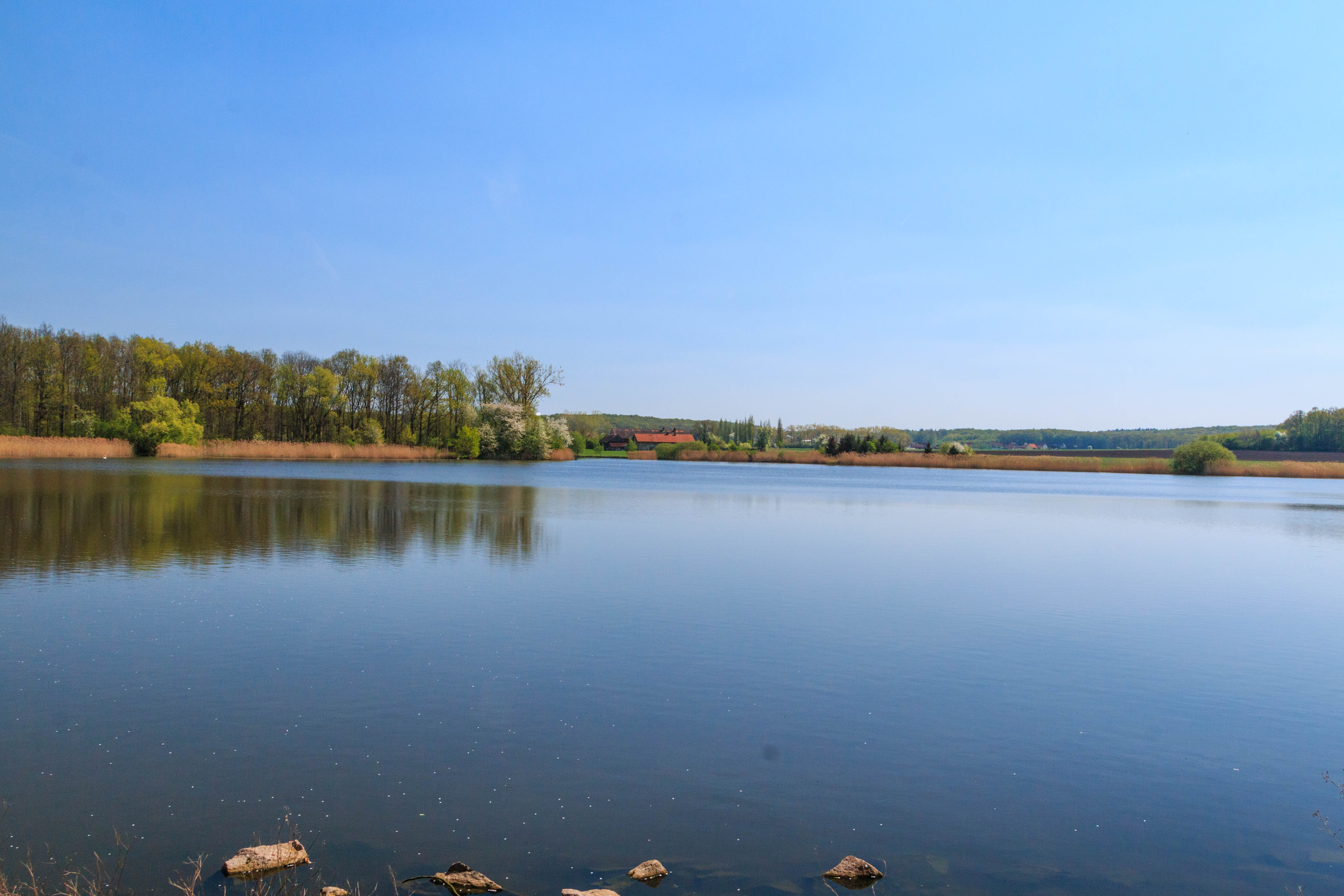 Štěpánský rybník u osady Opatov Project: Vodstvo.